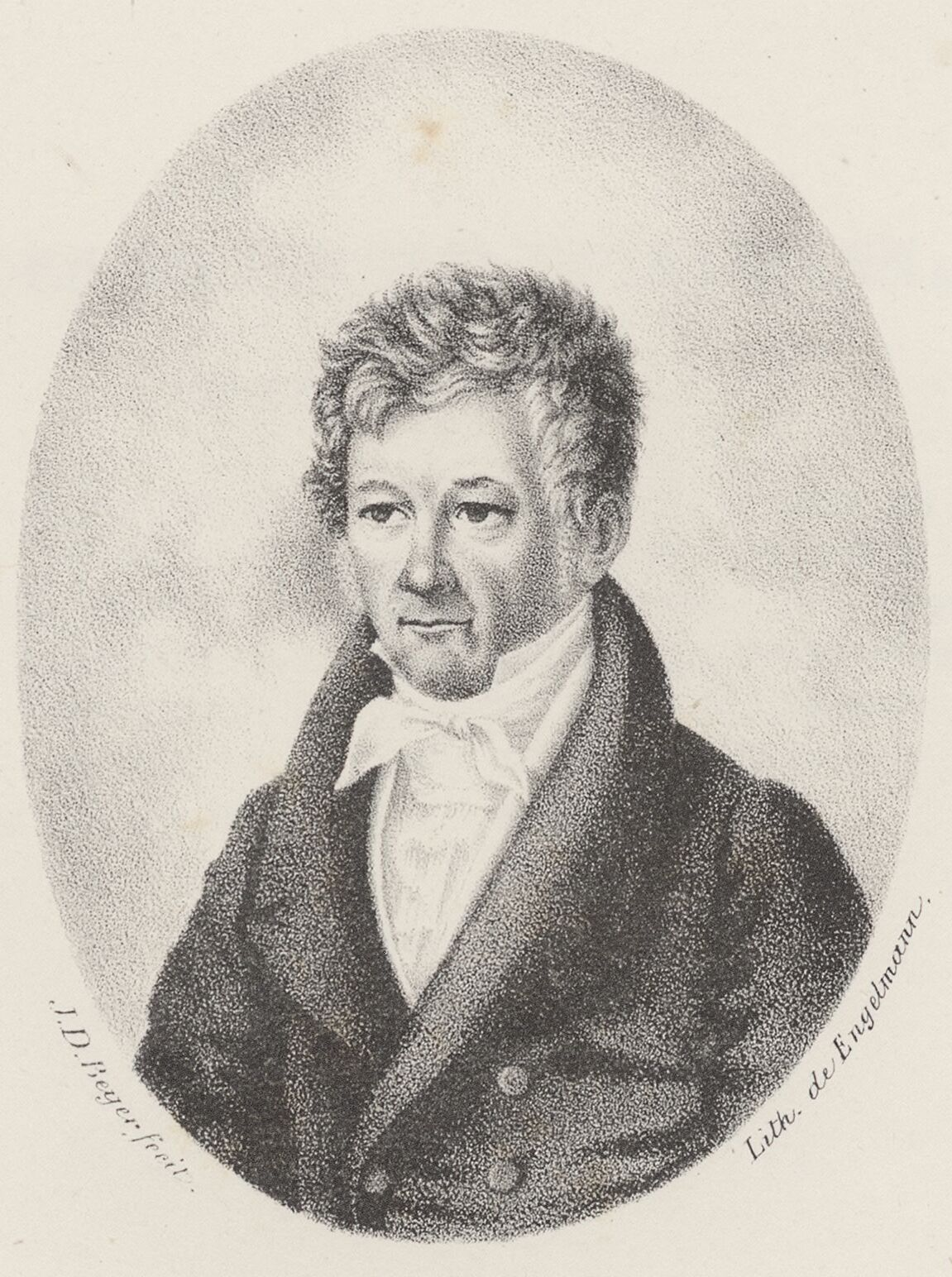 J.G. Schweighaeuser